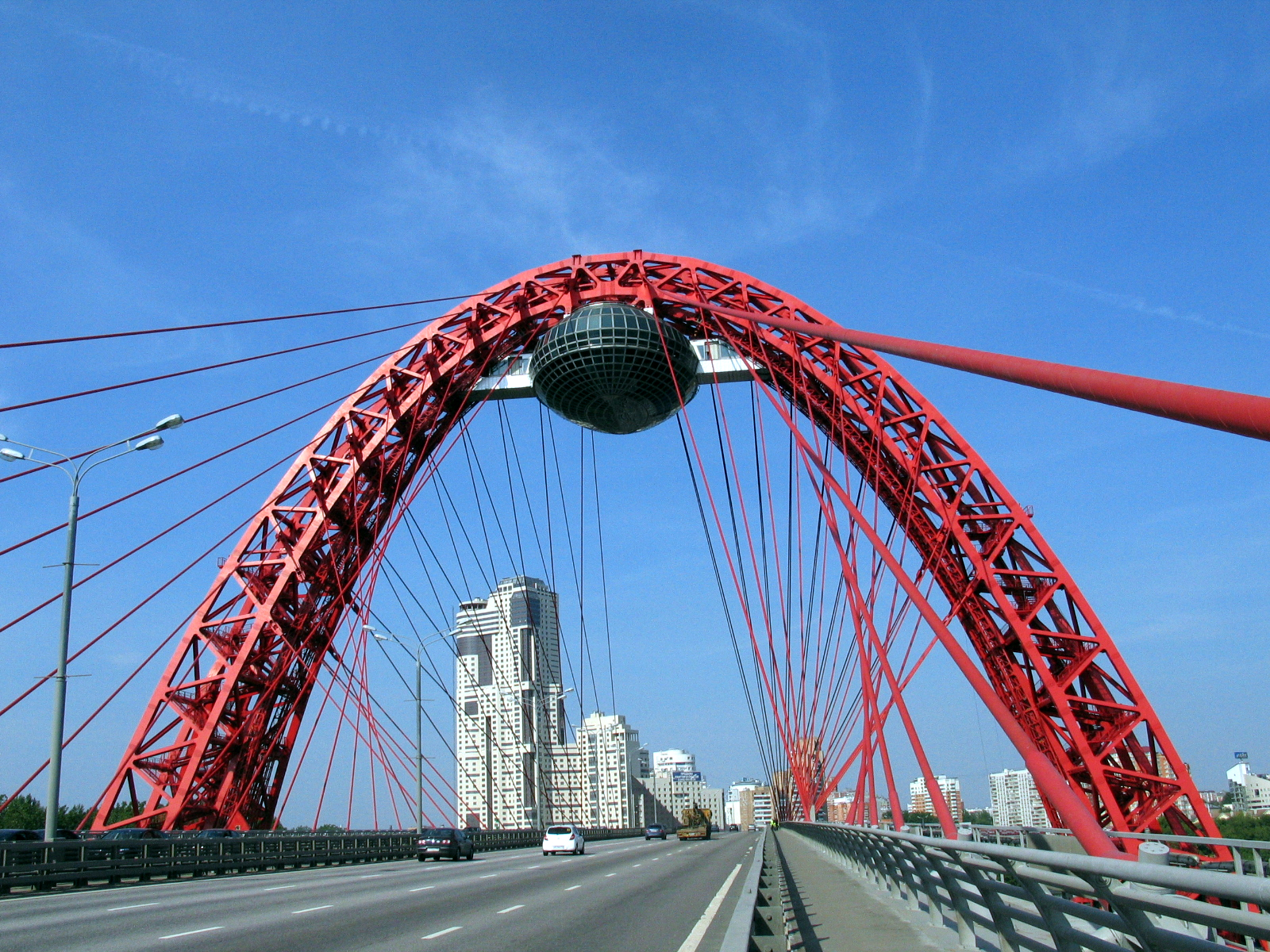 Живописный мост